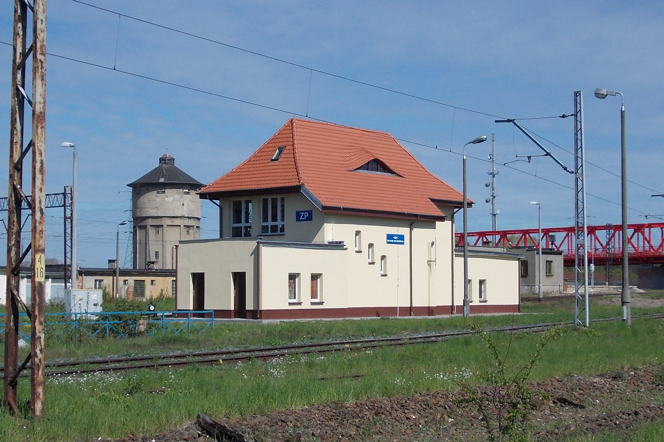 nastawnia ZP Gdańsk Zaspa Towarowa.